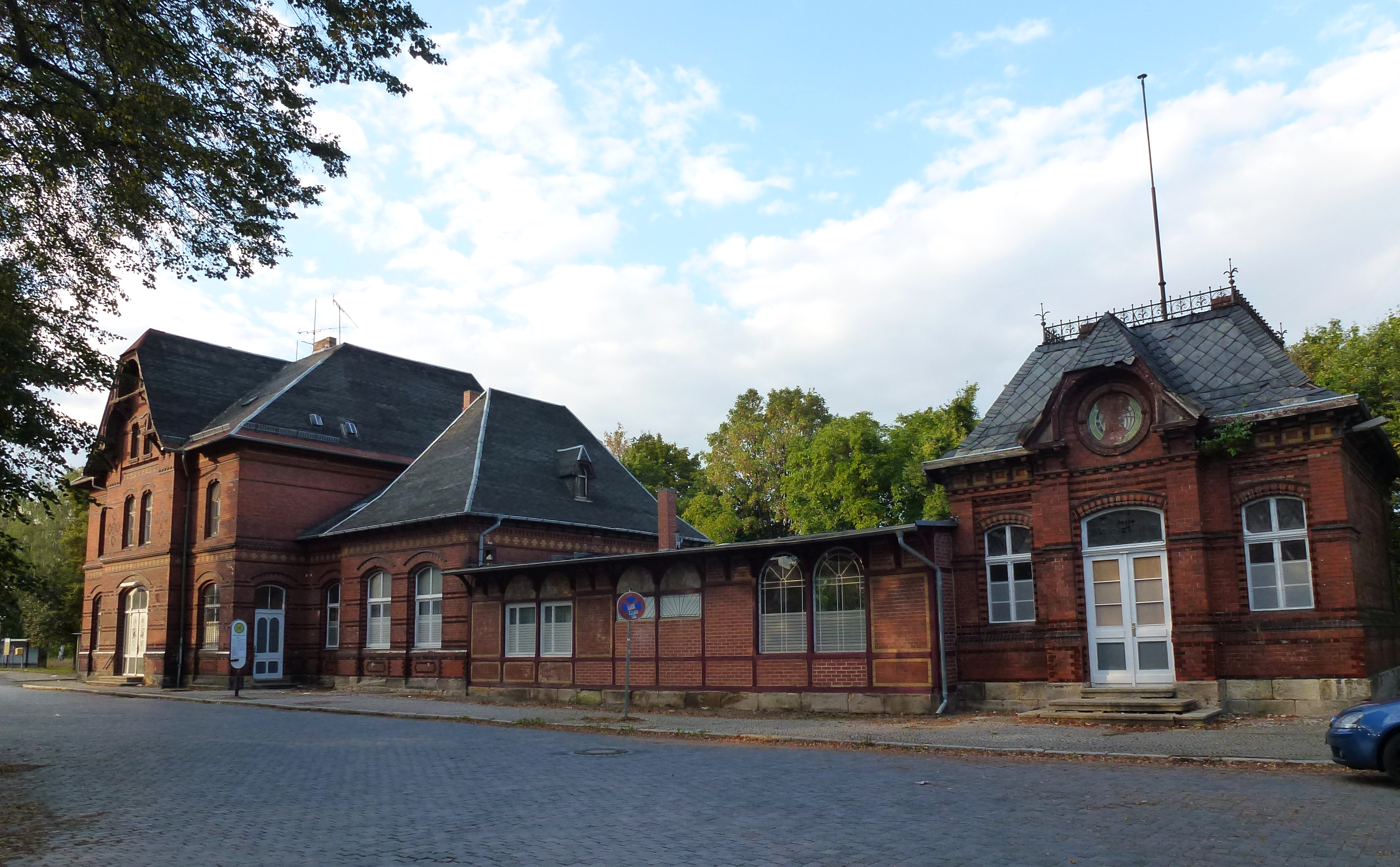 Bahnhof Schloss, Ballenstedt-West.